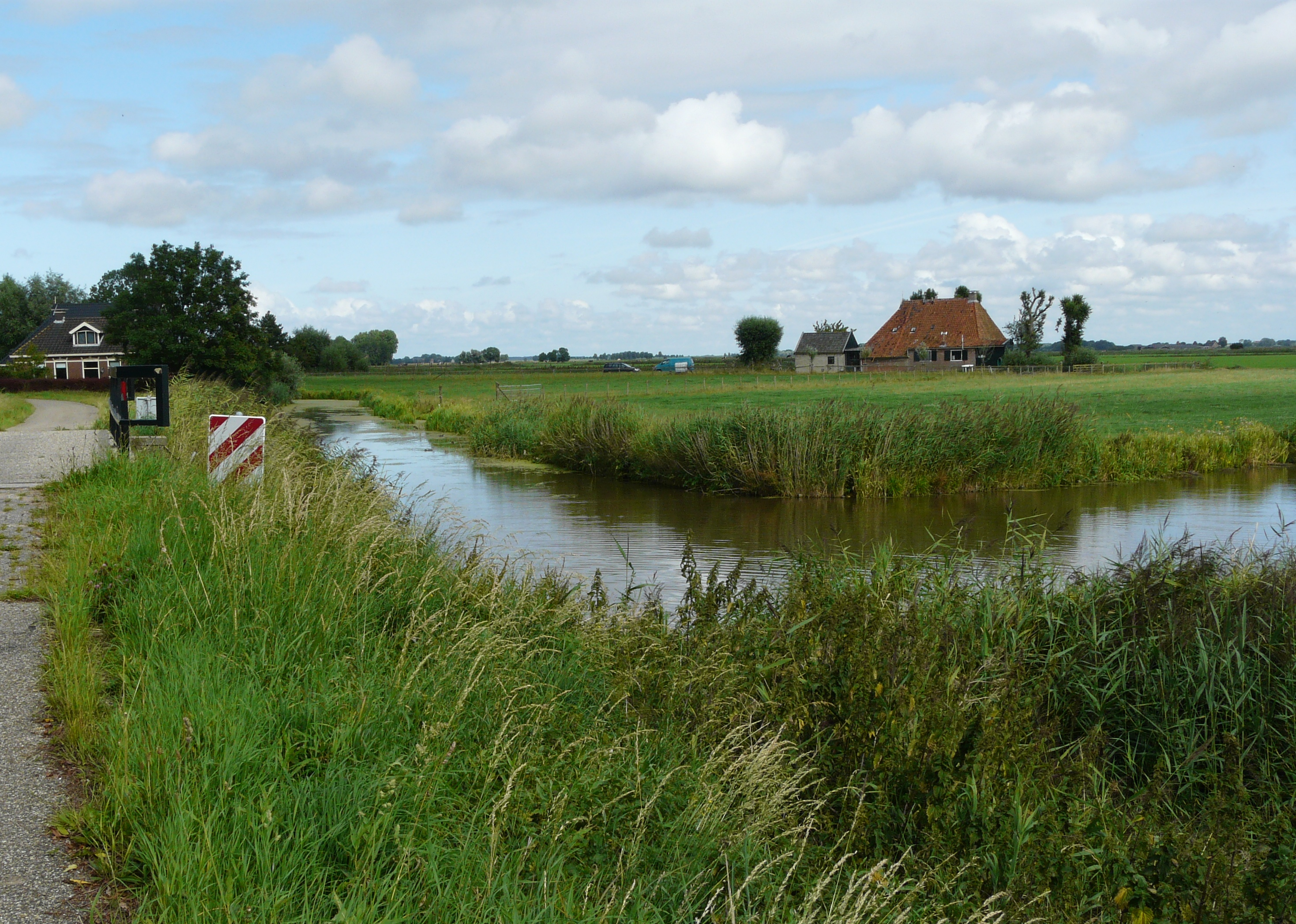 Eigen wurk